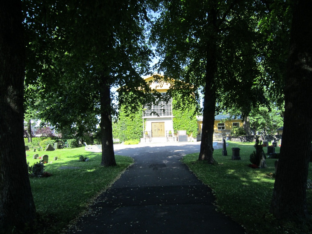 Horten kapell